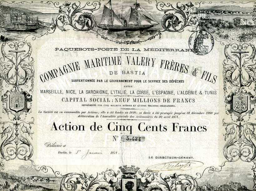 Action de 500 francs, Compagnie Maritime Valery Frères & Fils